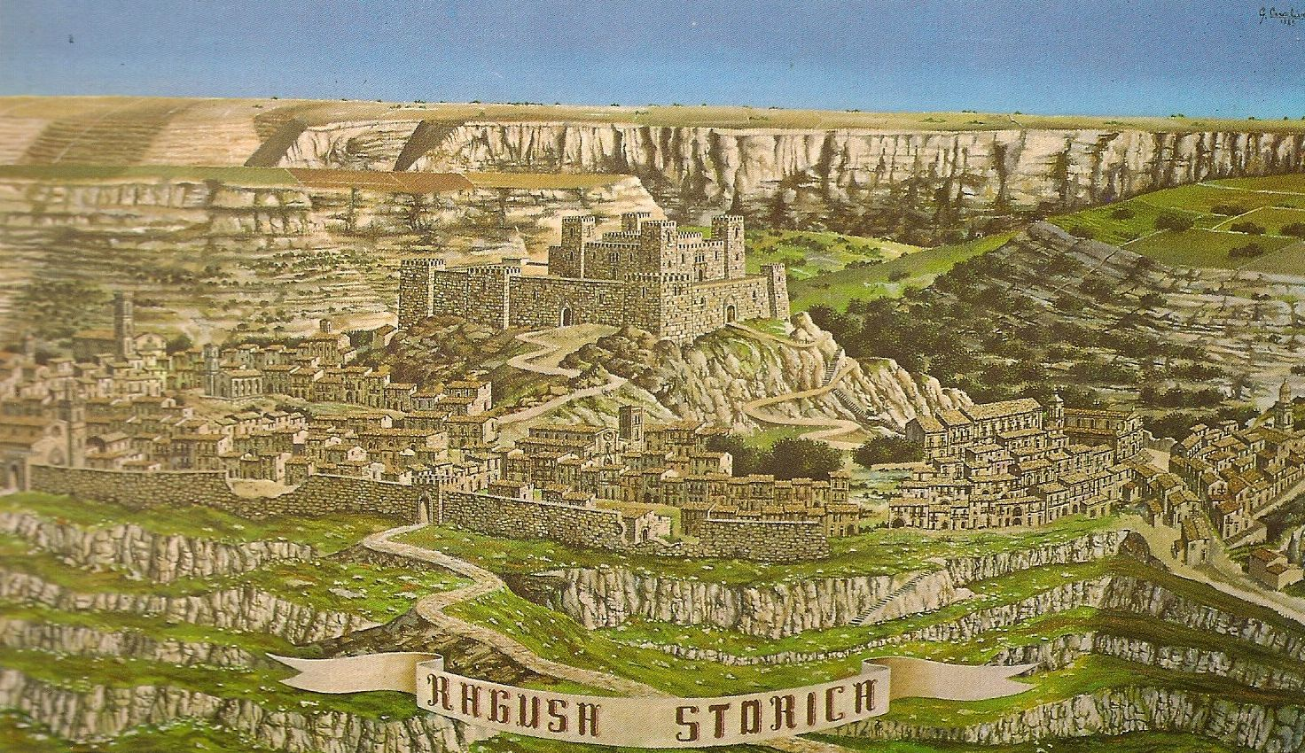 Dipinto di Giorgio Cavalieri